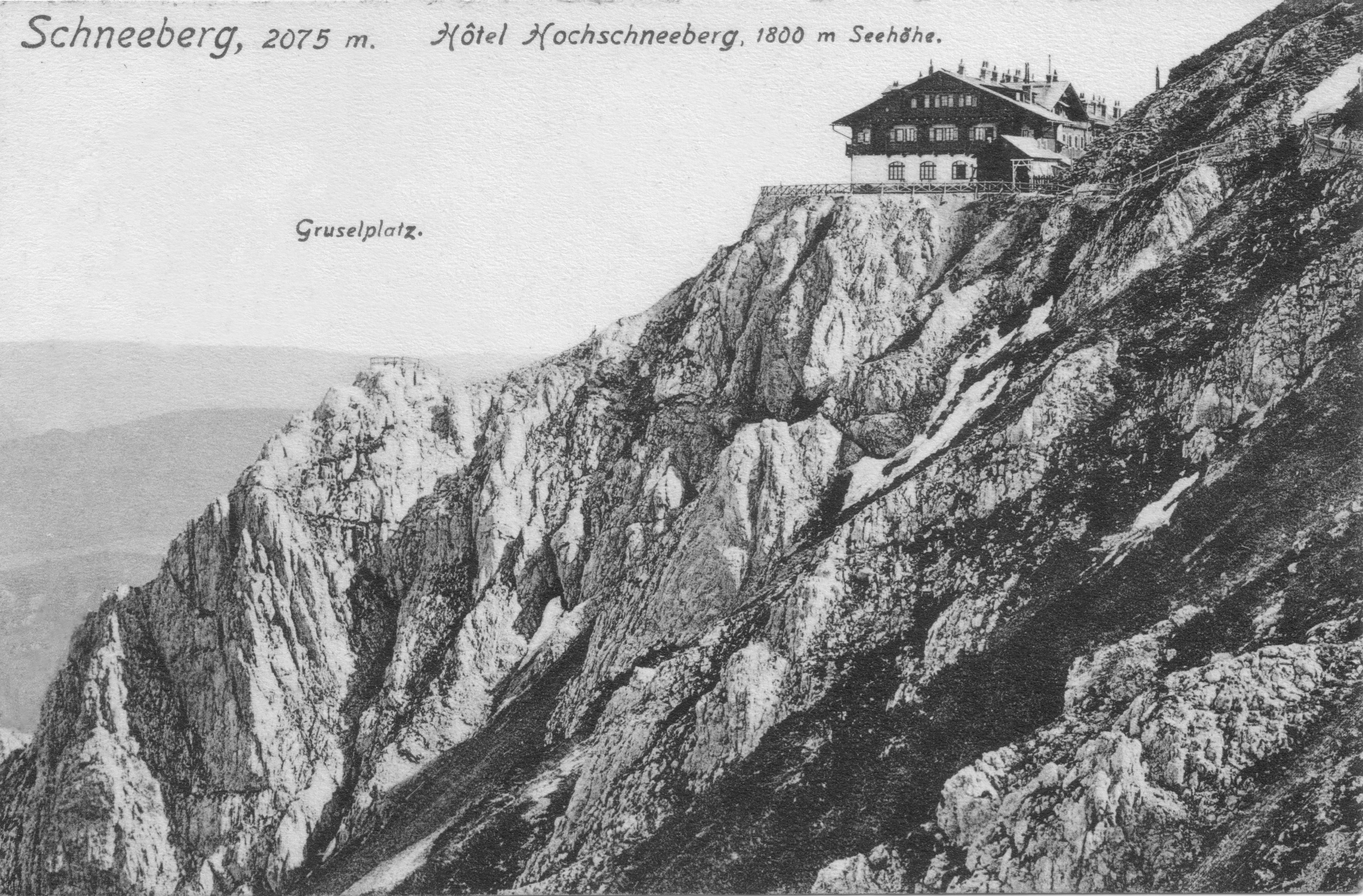 Berghotel Hochschneeberg 1912 mit dem Gruselplatz am Felsabhang. Die im Gelände erkennbaren Wege sind Varianten des oberen Herminensteiges, eines leichten Klettersteiges.